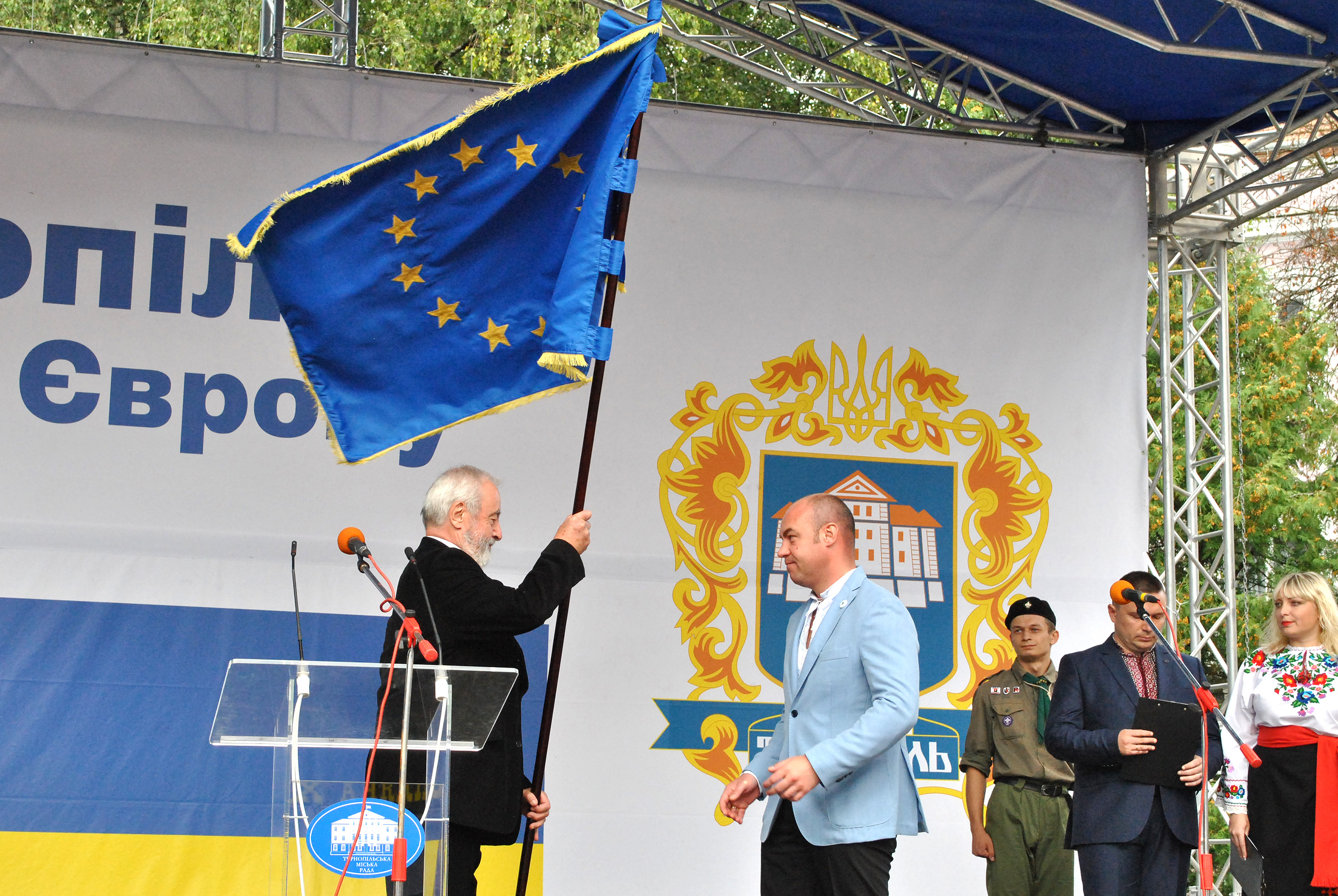 28 серпня Тернополю офіційно вручили Прапор Честі Ради Європи. Церемонія вручення відбулася на День міста на вулиці Гетьмана Сагайдачного біля пам'ятника Іванові Франкові. Почесний Прапор для міста з рук почесного члена парламентської Асамблеї Ради Європи, колишнього члена парламенту Швейцарської конфедерації Віктора Руфі отримав міський голова Сергій Надал.